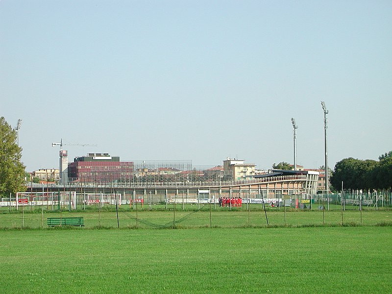 Stadion Danilo Martelli und Trainingsgelände der AC Mantova Source: photo uploaded by User:RicciSpeziari. Photographer: Riccardo Speziari